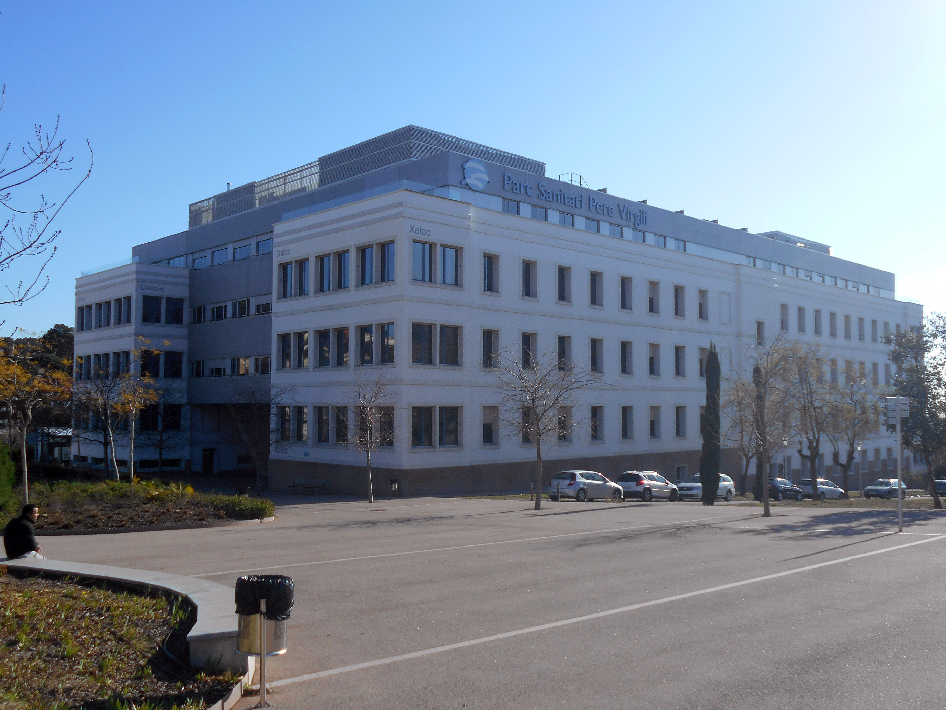 Parque Sanitario Pere Virgili, edificios Llevant y Xaloc.